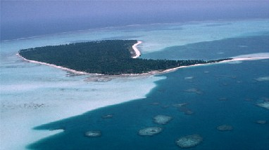 Kavaratti Island, Lakshadweep, India